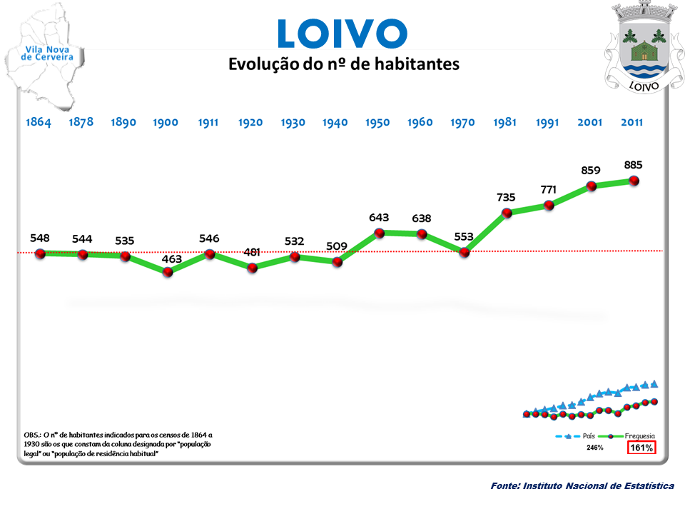 Censos 1864/2011